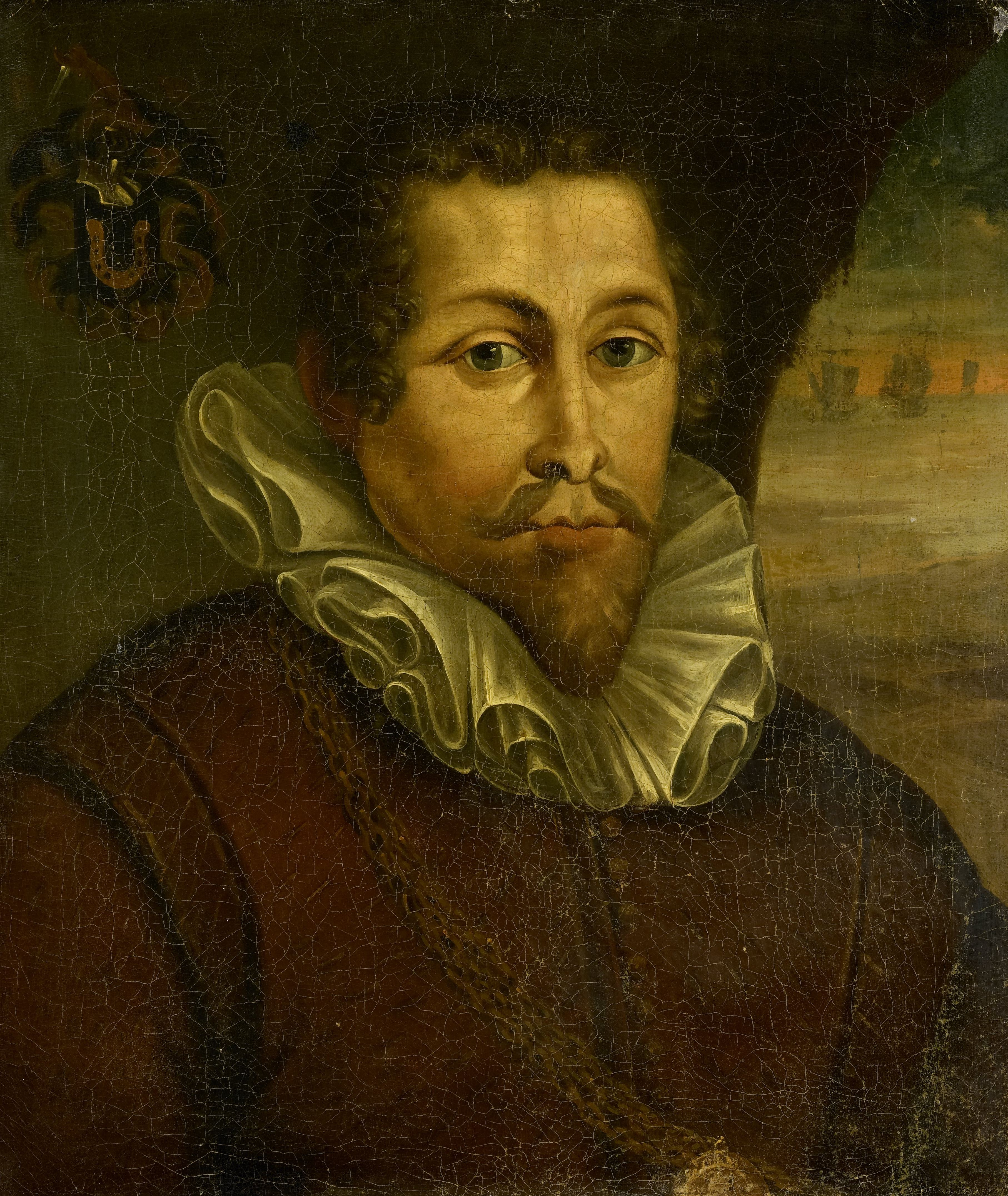 Portret van Pieter Willemsz Verhoeff (c. 1573-1609). Kapitein (1600) en commandeur (1607) bij de Verenigde Oost-Indische Compagnie. Vermoord op Banda. Buste, bijna aanziend. Om de borst een veelvoudige gouden keten met medaillon, rechts op de achtergrond een zeegezicht met schepen. Linksboven het familiewapen.